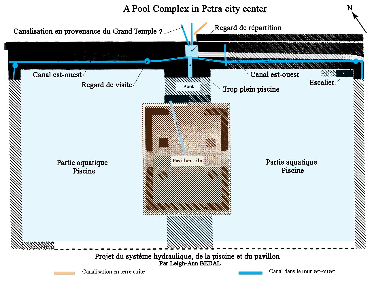 Projet du réseau hydraulique, piscine et pavillon du Pool Complex de Pétra. Re-inscrire les textes en français et colorisation du dessin.